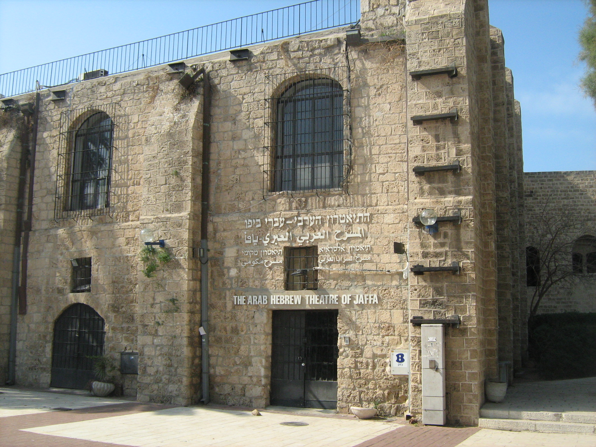 הסראיה הישנה והתיאטרון היהודי ערבי ביפו